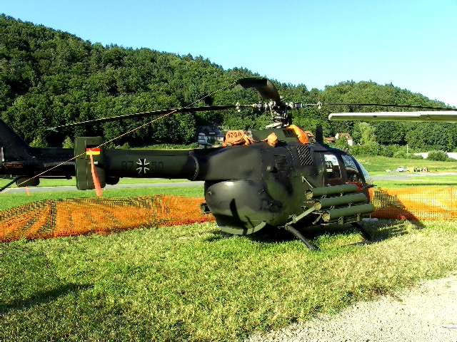 Kampfhubschrauber PAH BO 105 P-1A1 des Kampfhubschrauberregiments 26 "Franken".